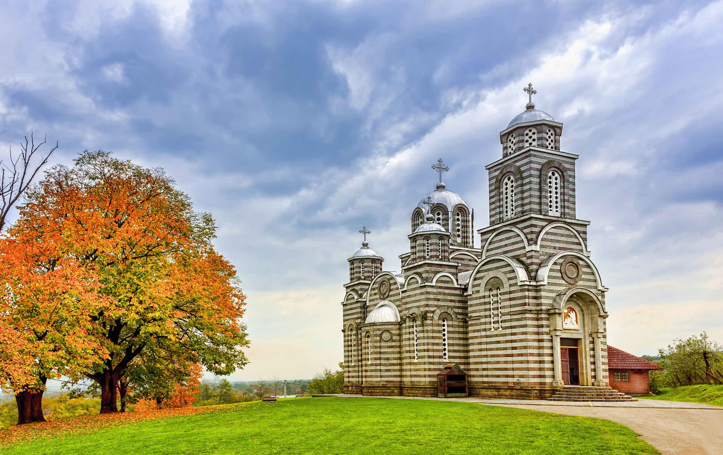 Ово је фотографија заштићеног природног добра у Србији под шифром: СП178 This is a a photo of a natural area in Serbia with ID: СП178